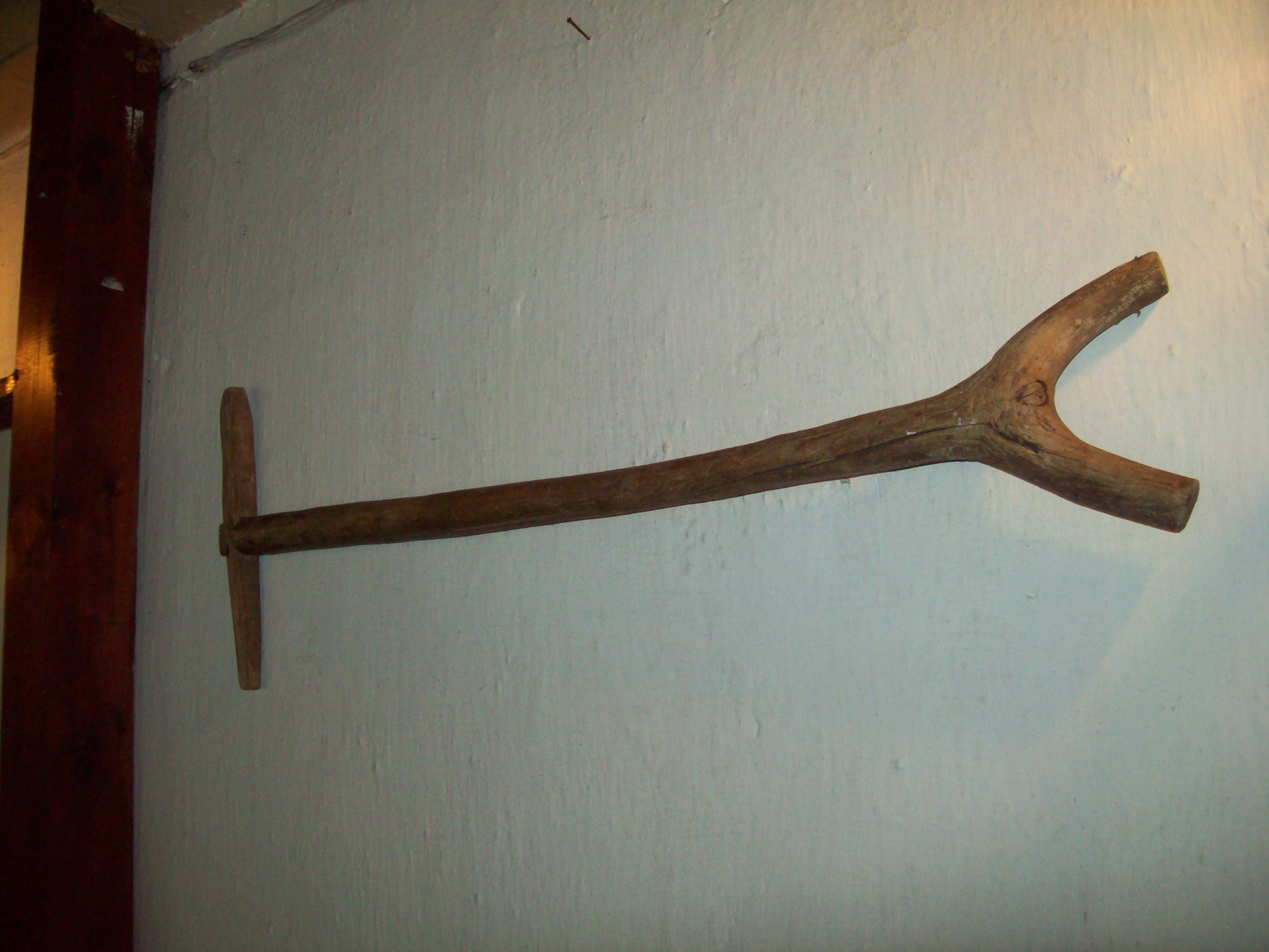 Мотовилка